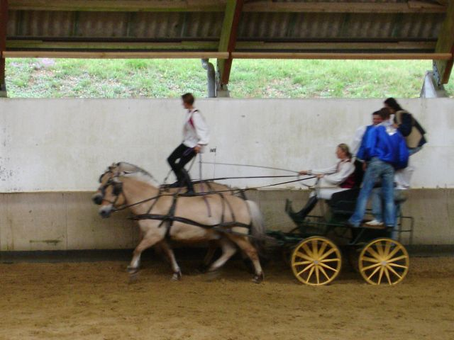 Spectacle équestre au Club Med de Pompadour avec un attelage de deux fjords (César et Cap Nord). Photo : Laurent Nguyen. Date : 19-juillet-2006. License : CC-BY-SA-2.5